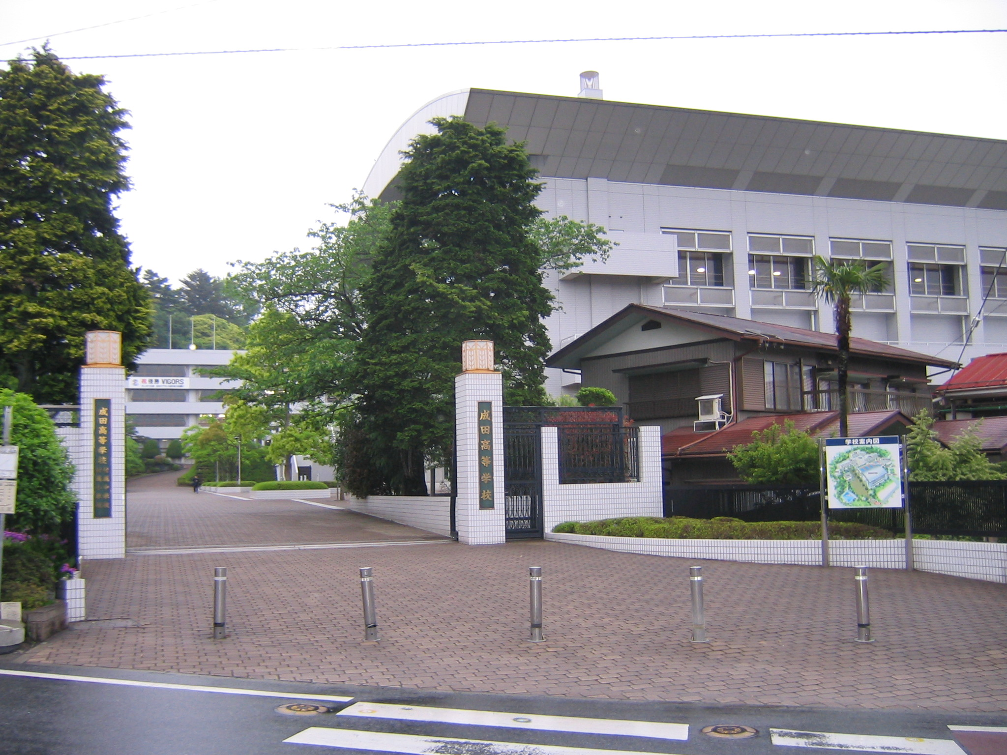 成田高等学校